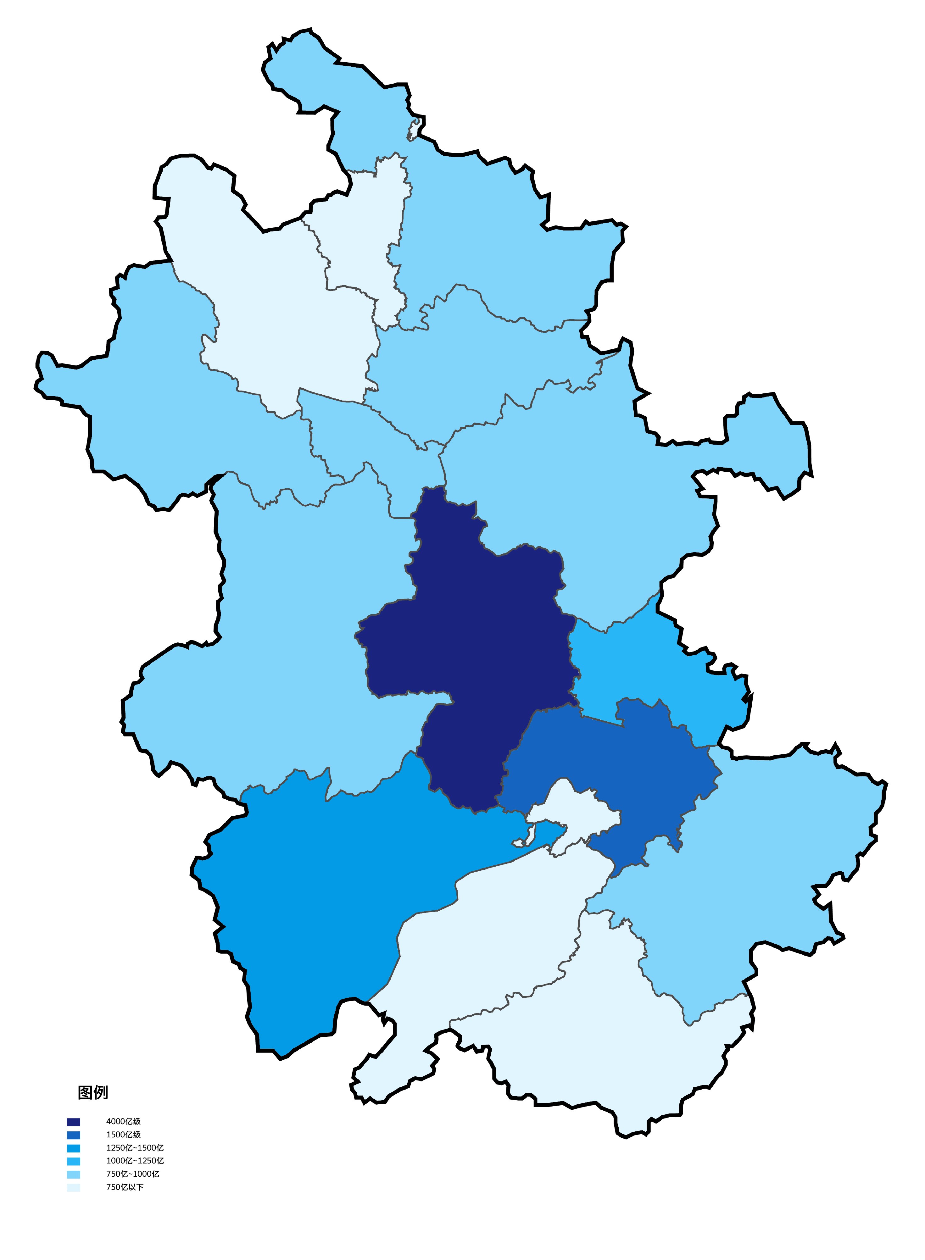 中文（中国大陆）: 安徽省各地级市根据2012年地区生产总值填色地图